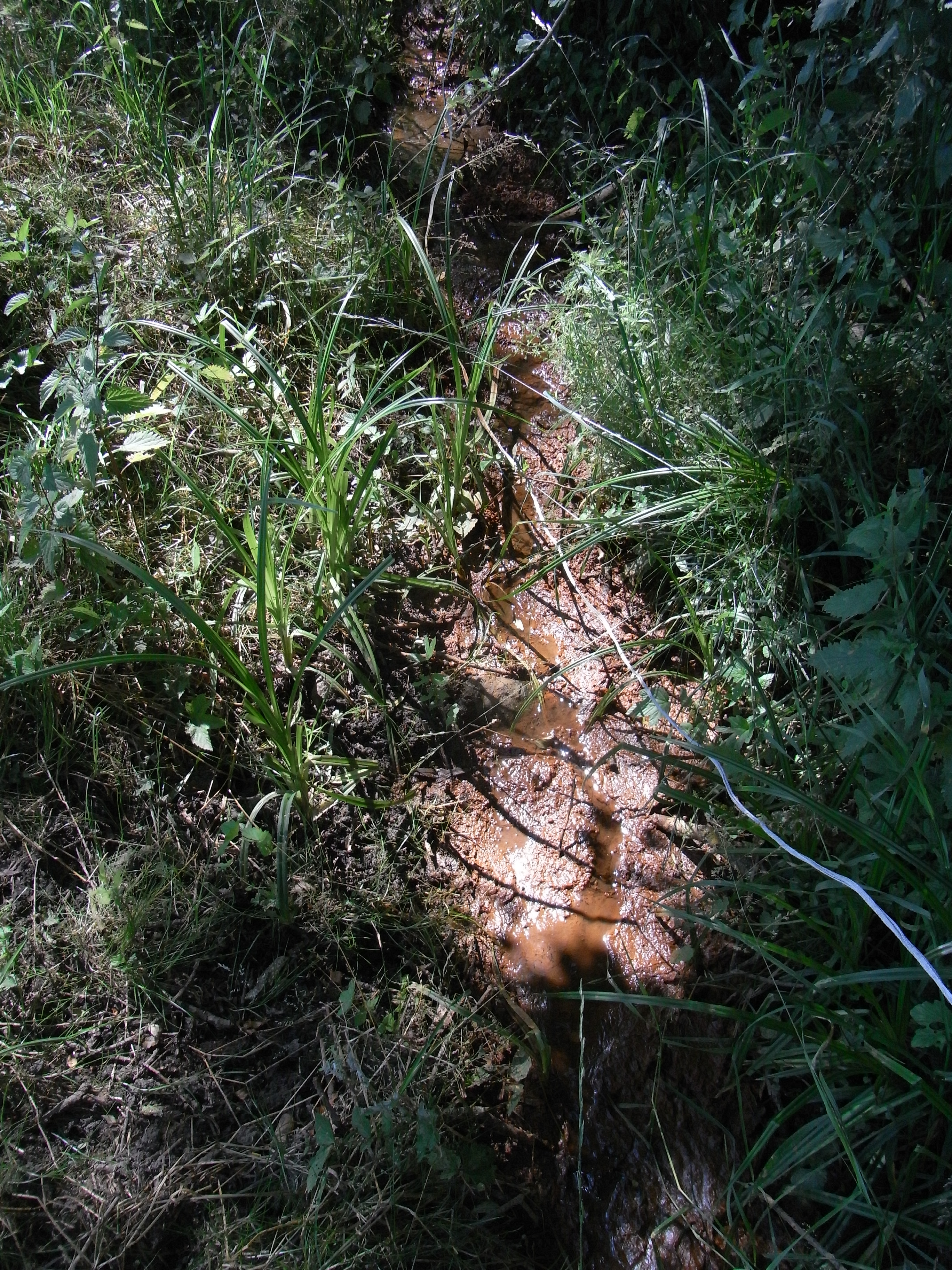 Unterhalb der Mineralquellen bei km 0,55 führt der Erlenbach wieder Wasser